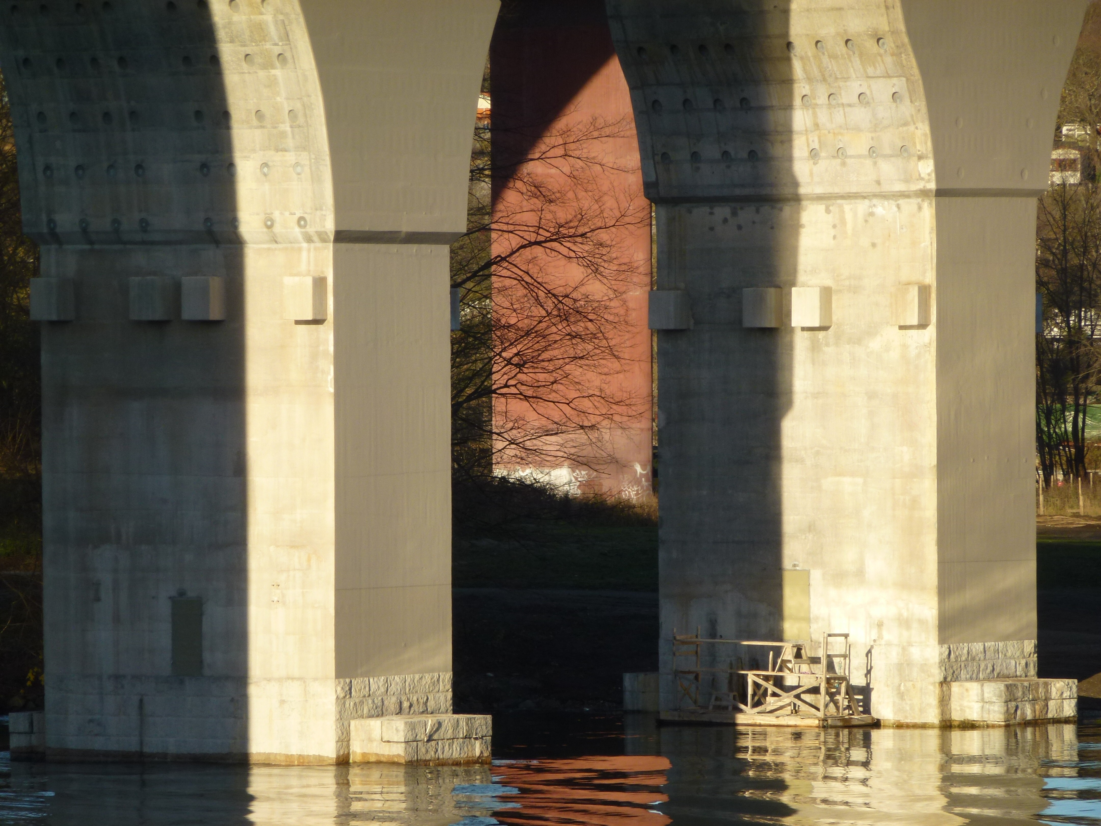 Östra Årstabron